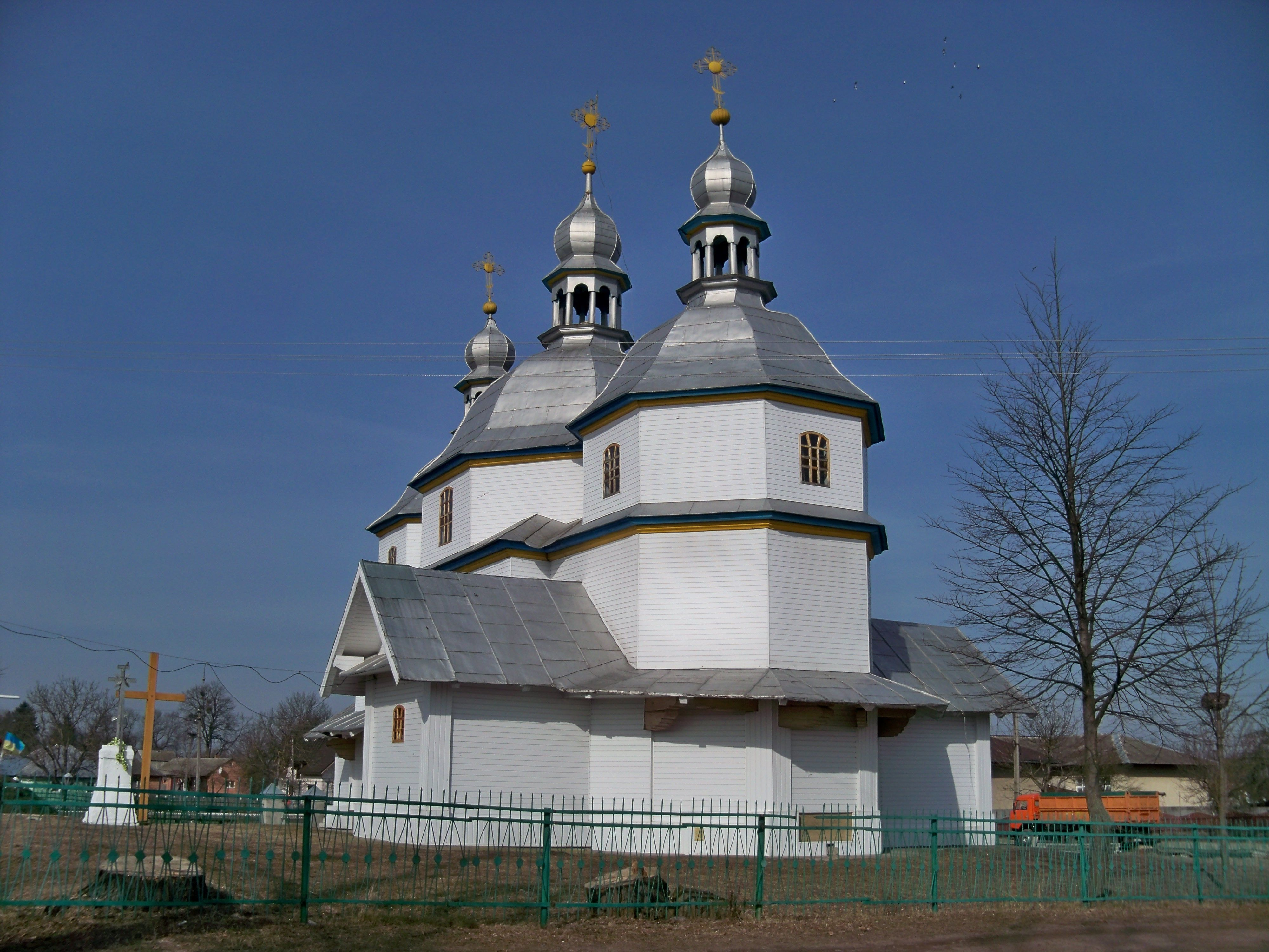 Церква Воздвиження Чесного Хреста /дер./, с.Горбків